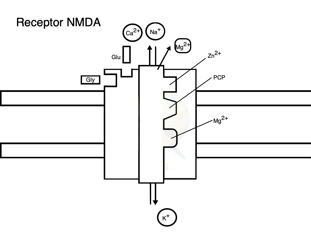 Representació esquemática del receptor NMDA